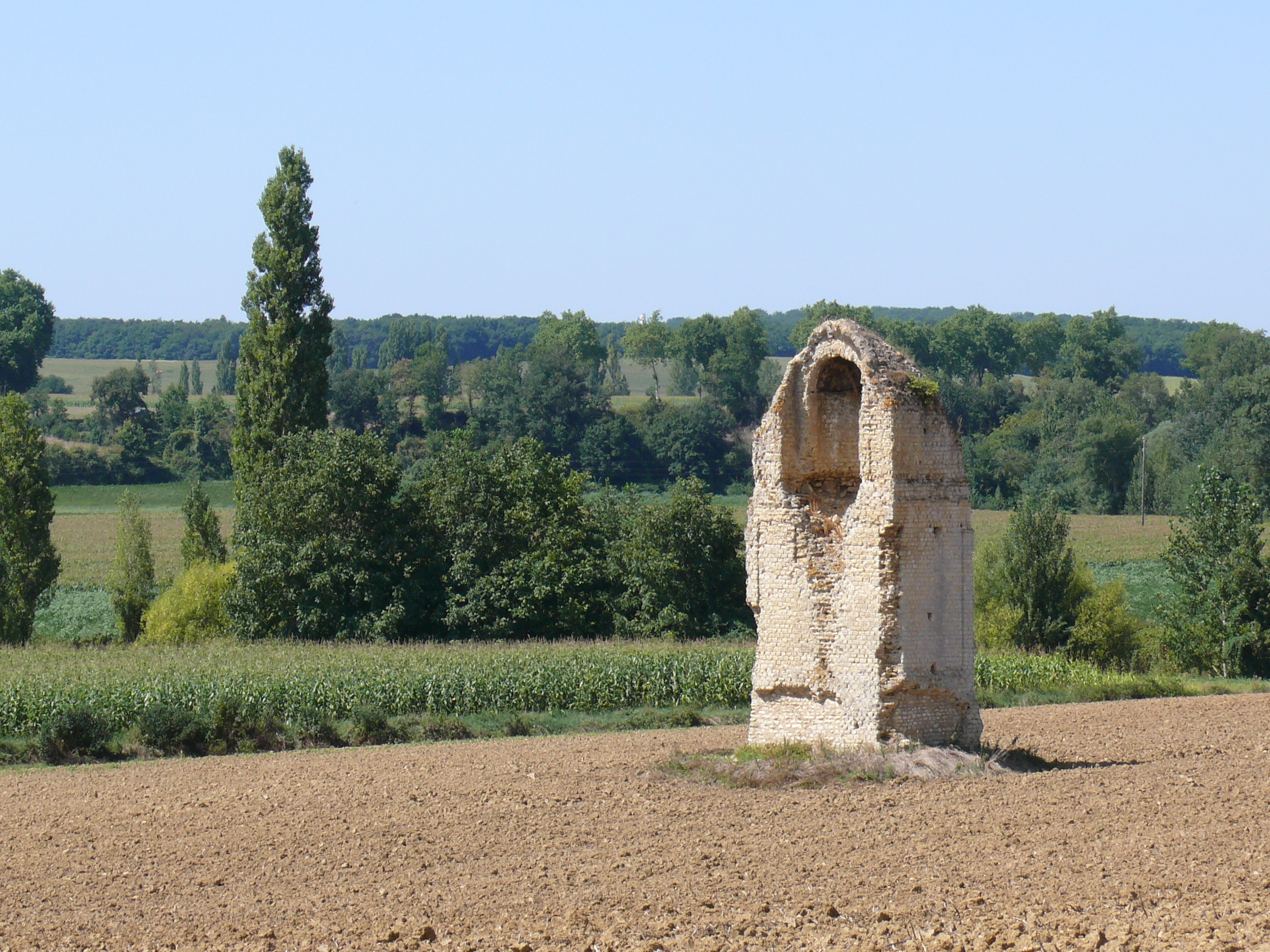 Tour gallo-romaine de Biran (Gers, Midi-Pyrénées, France).